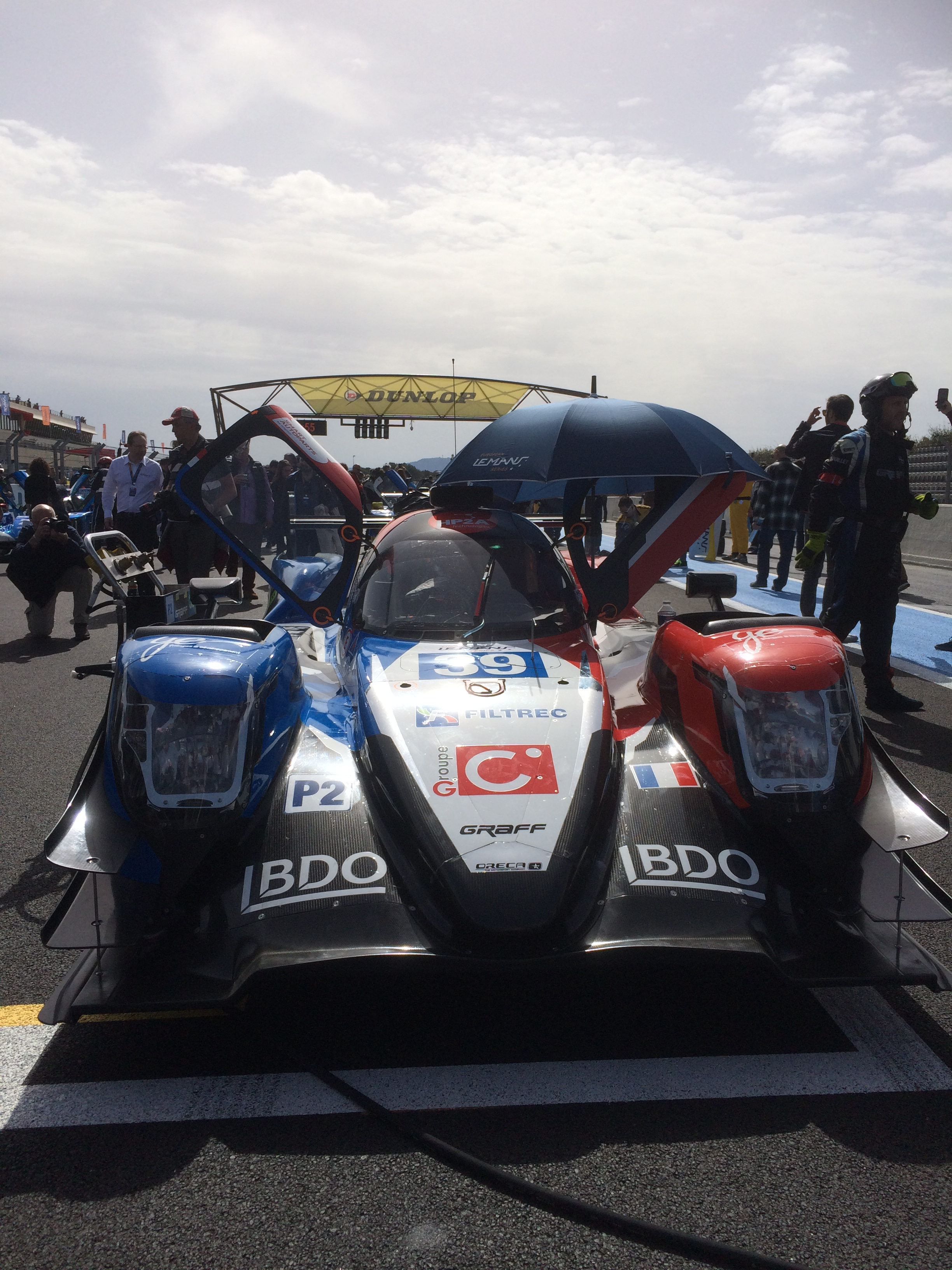 Graff 39 - ELSM - Paul Ricard - Race grid